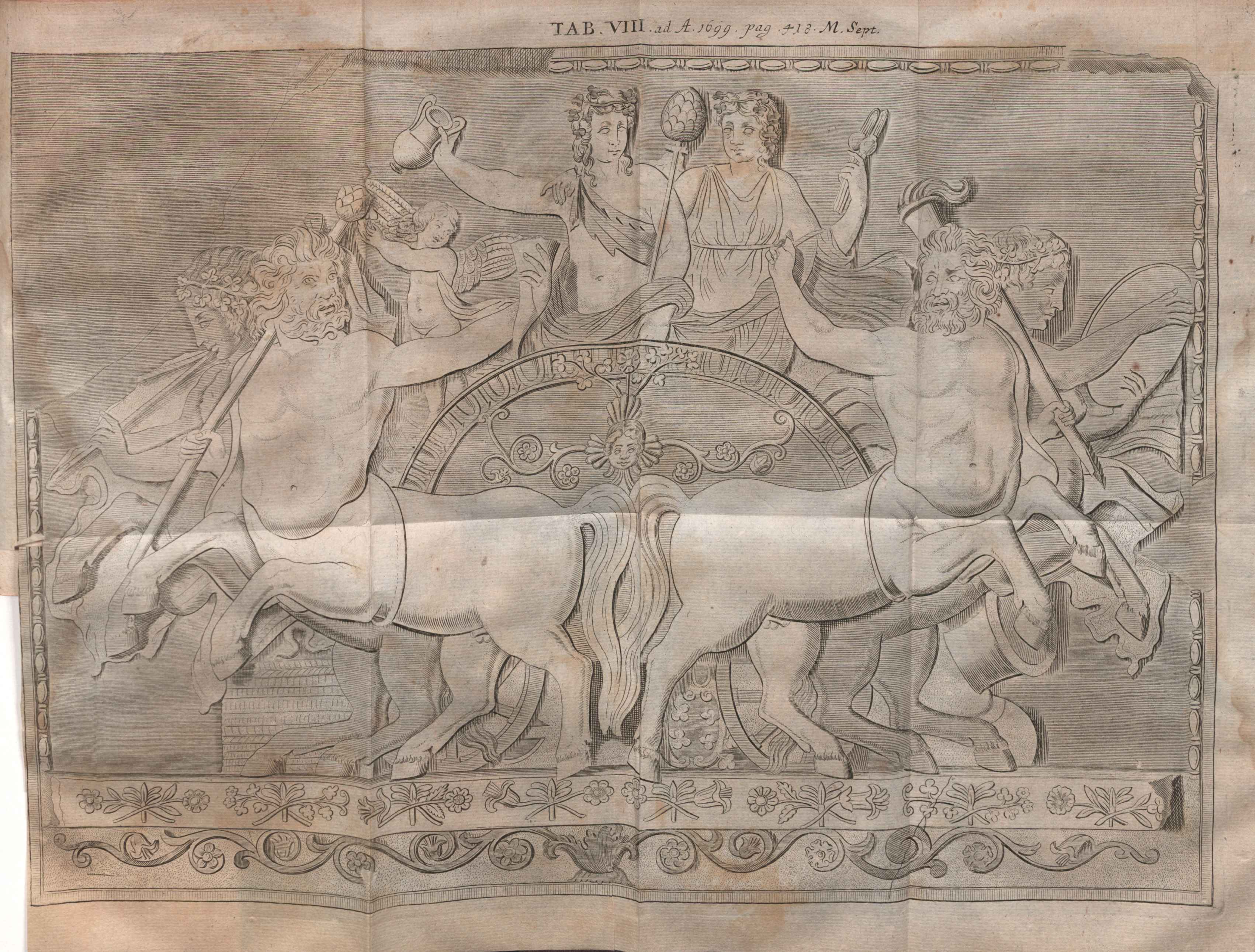 Illustration